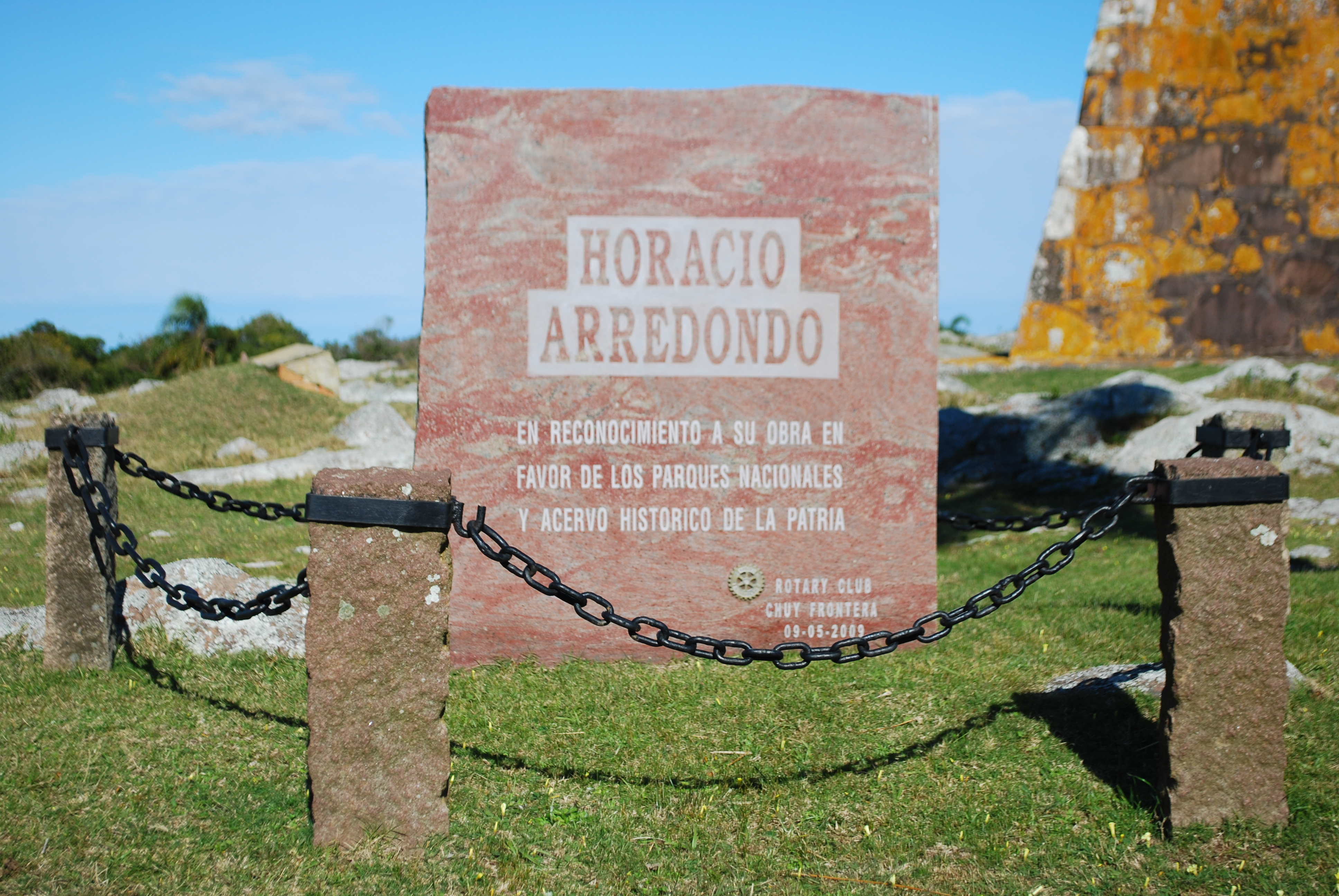 Placa de piedra en la entrada del Fuerte San Miguel, Uruguay.